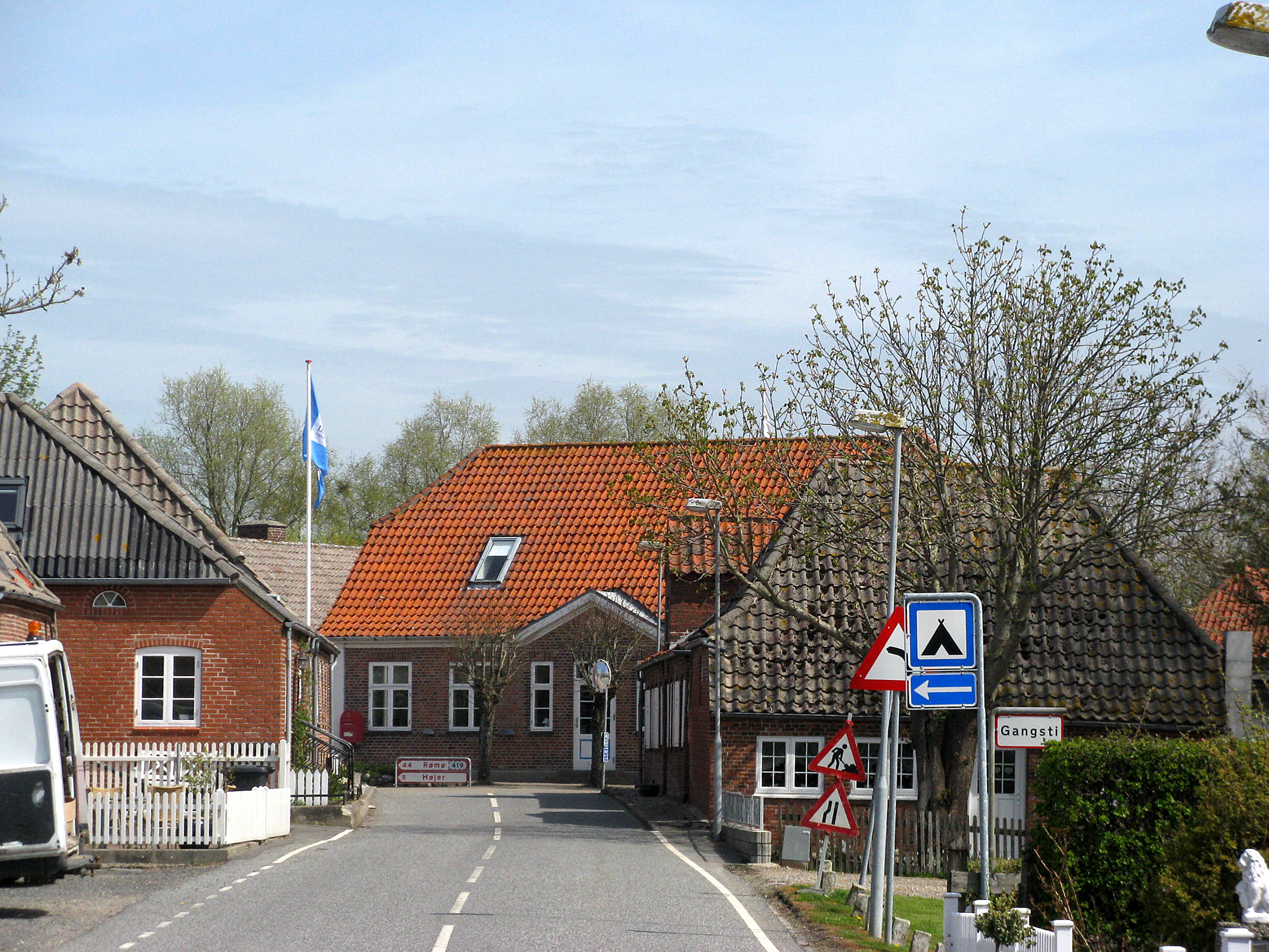 Rudbøl set fra broen over Vidåen.